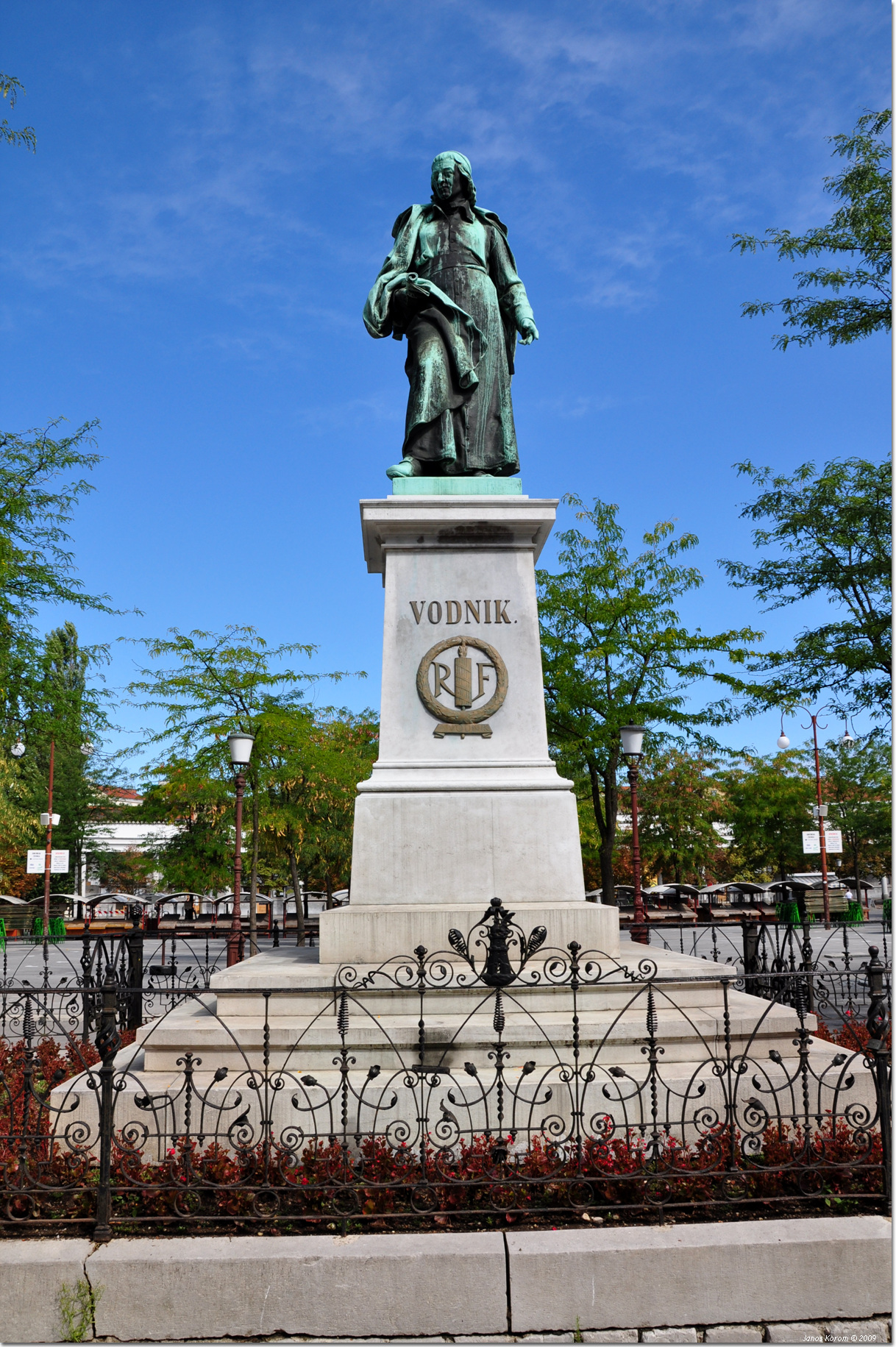 Ljubljana (211)